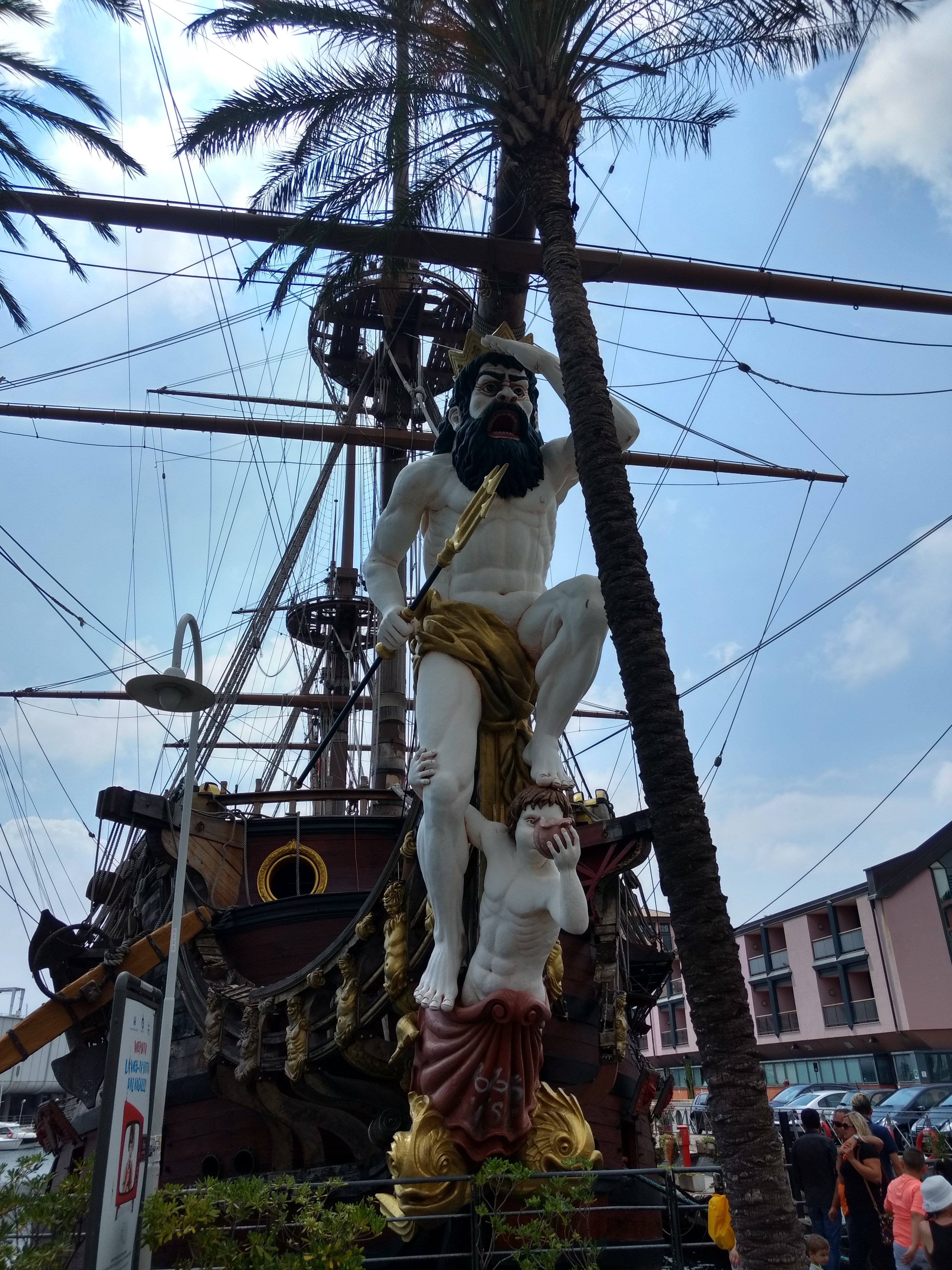 Galleon replica Neptune in Genova